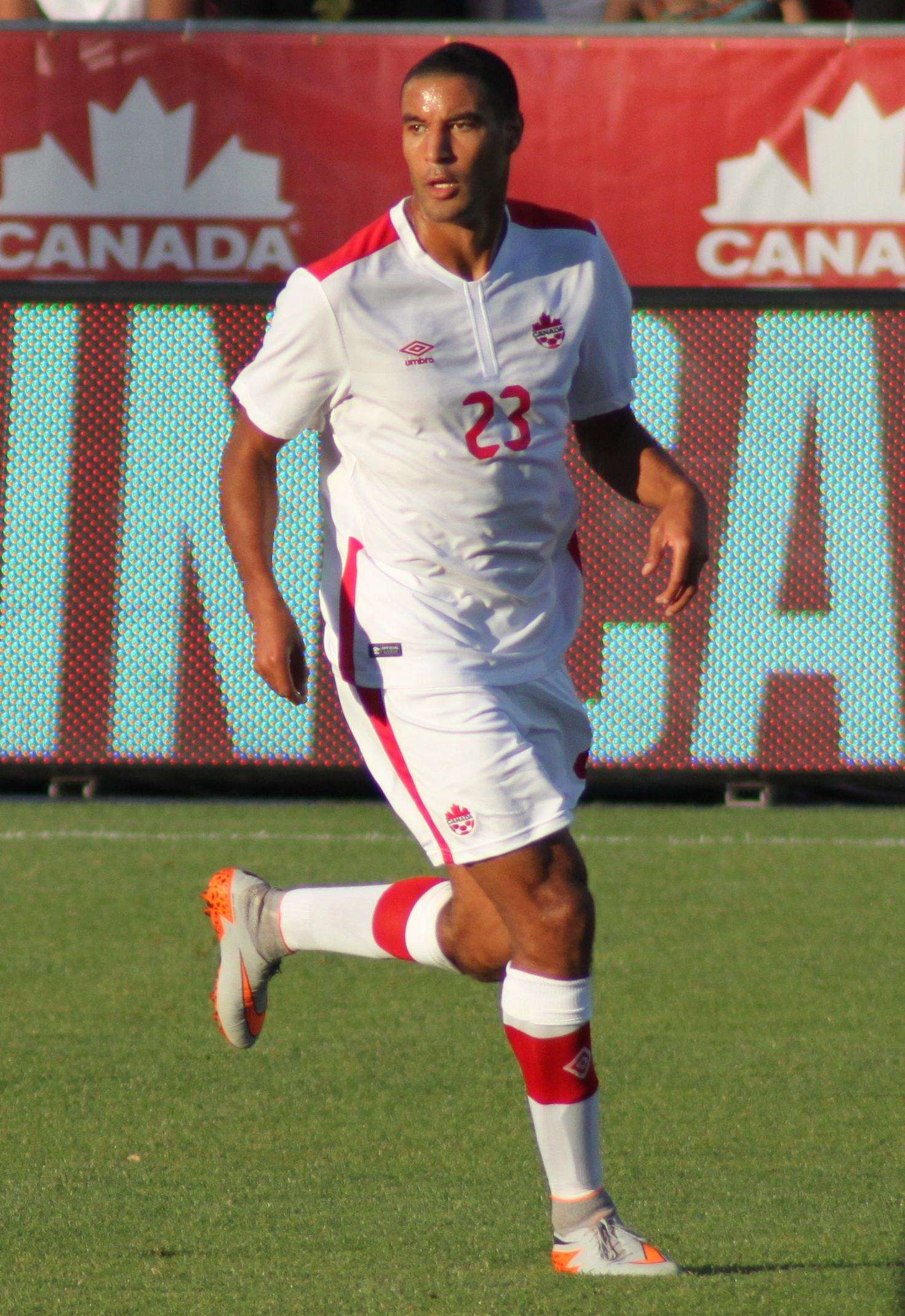 2015-06-16 Canada vs Dominica WCQ at BMO Field (soccer)